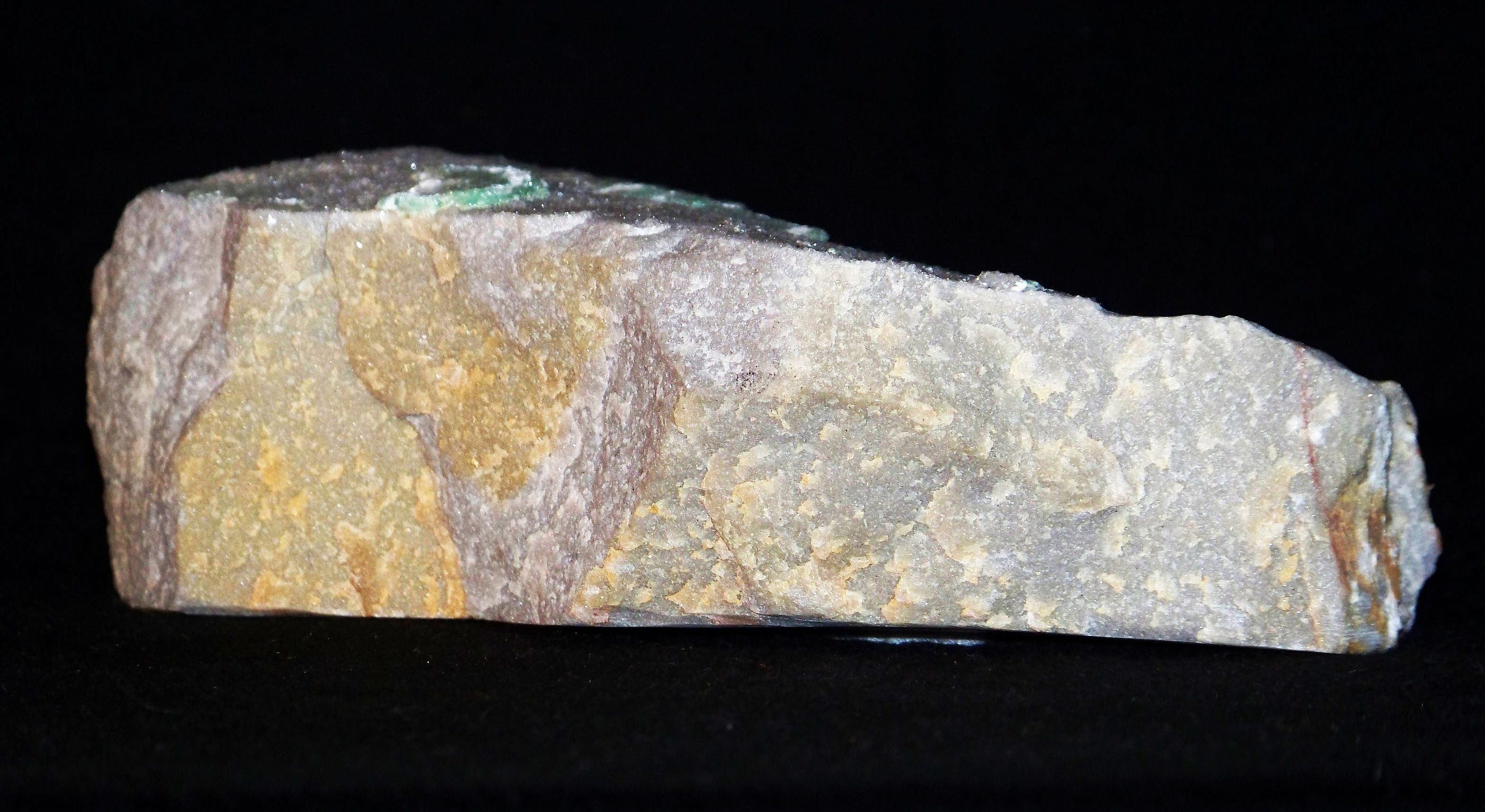 górnokambryjski kwarcyt osadowy, kopalnia Wiśniówka Duża, wieś Wiśniówka, gmina Masłów, województwo świętokrzyskie